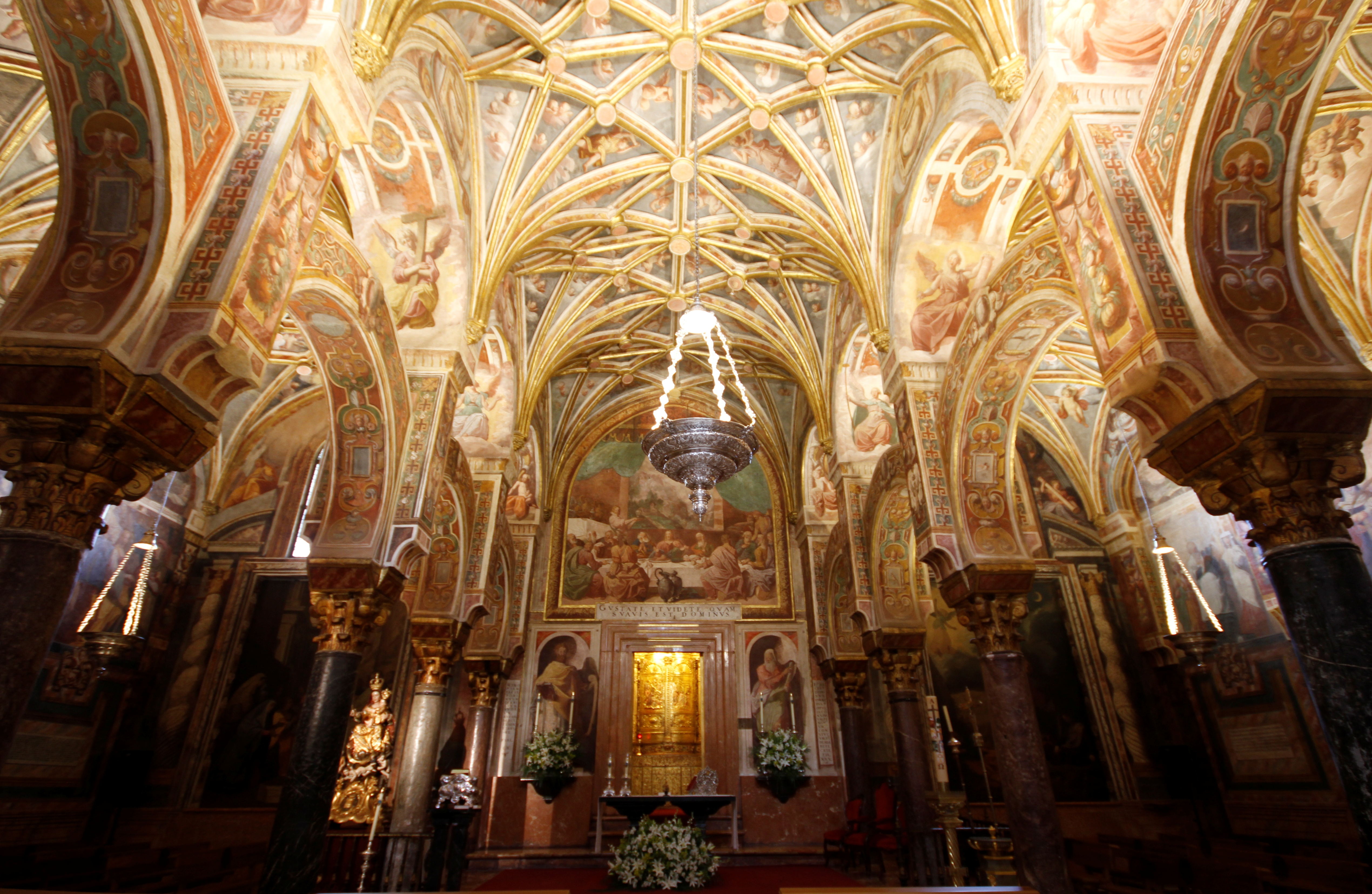 Capela do Sagrário